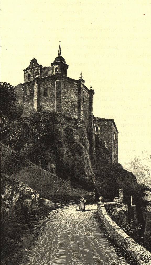 Ermita de San Saturio, patrono de Soria.